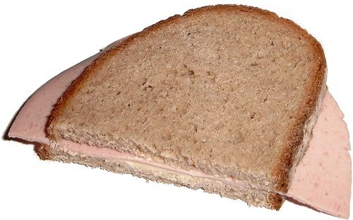 Ein Wurstbrot aus der Region des Niederrheins. Standardmodell mit Butter, Wurst und zwei Scheiben Brot.